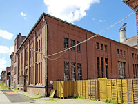 KitKatClub